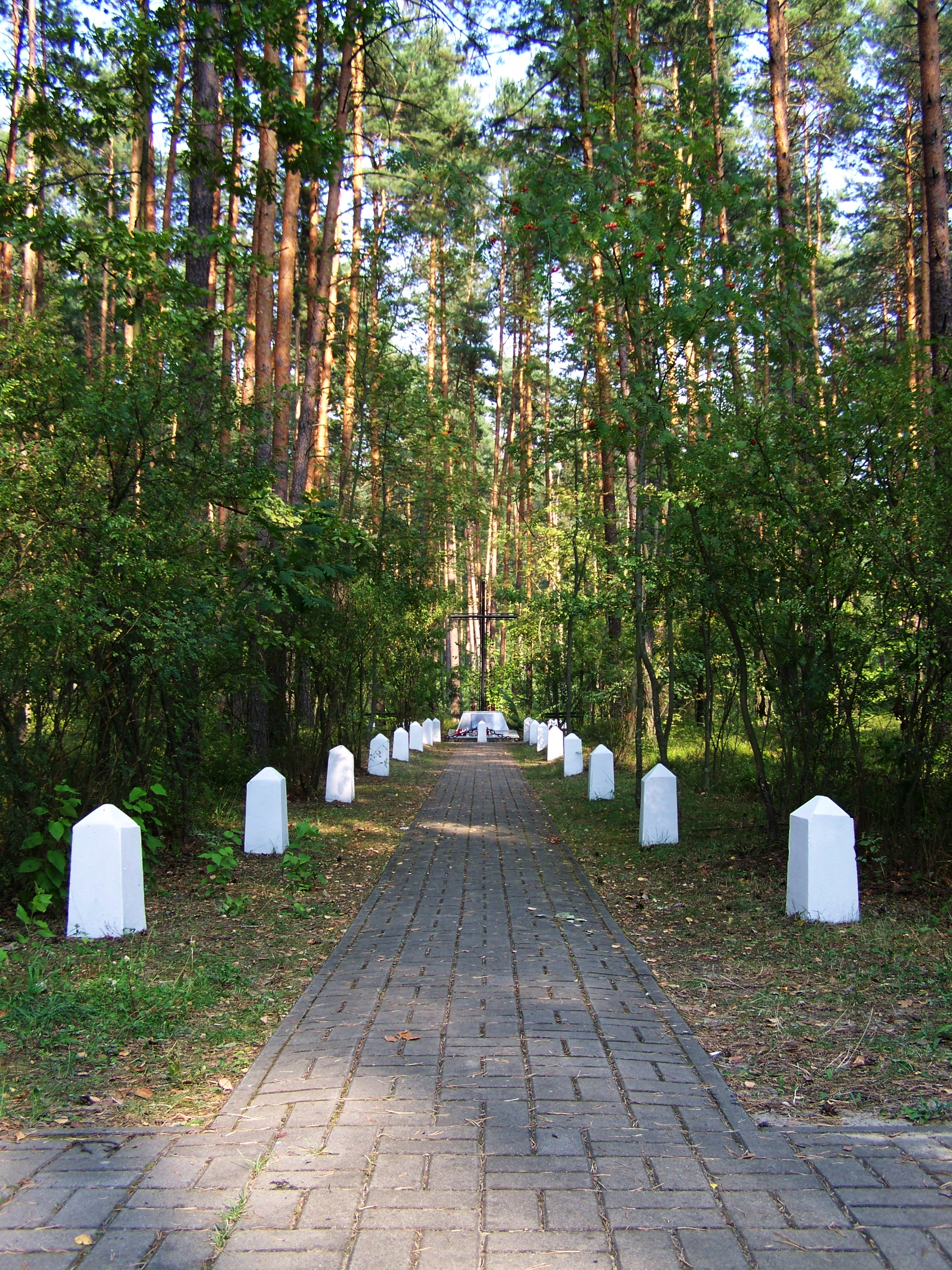 Krzyż w miejscu egzekucji 63 partyzantów, jeńców bitwy pod Osuchami, zamordowanych na Rapach przez hitlerowców w 1944 roku.